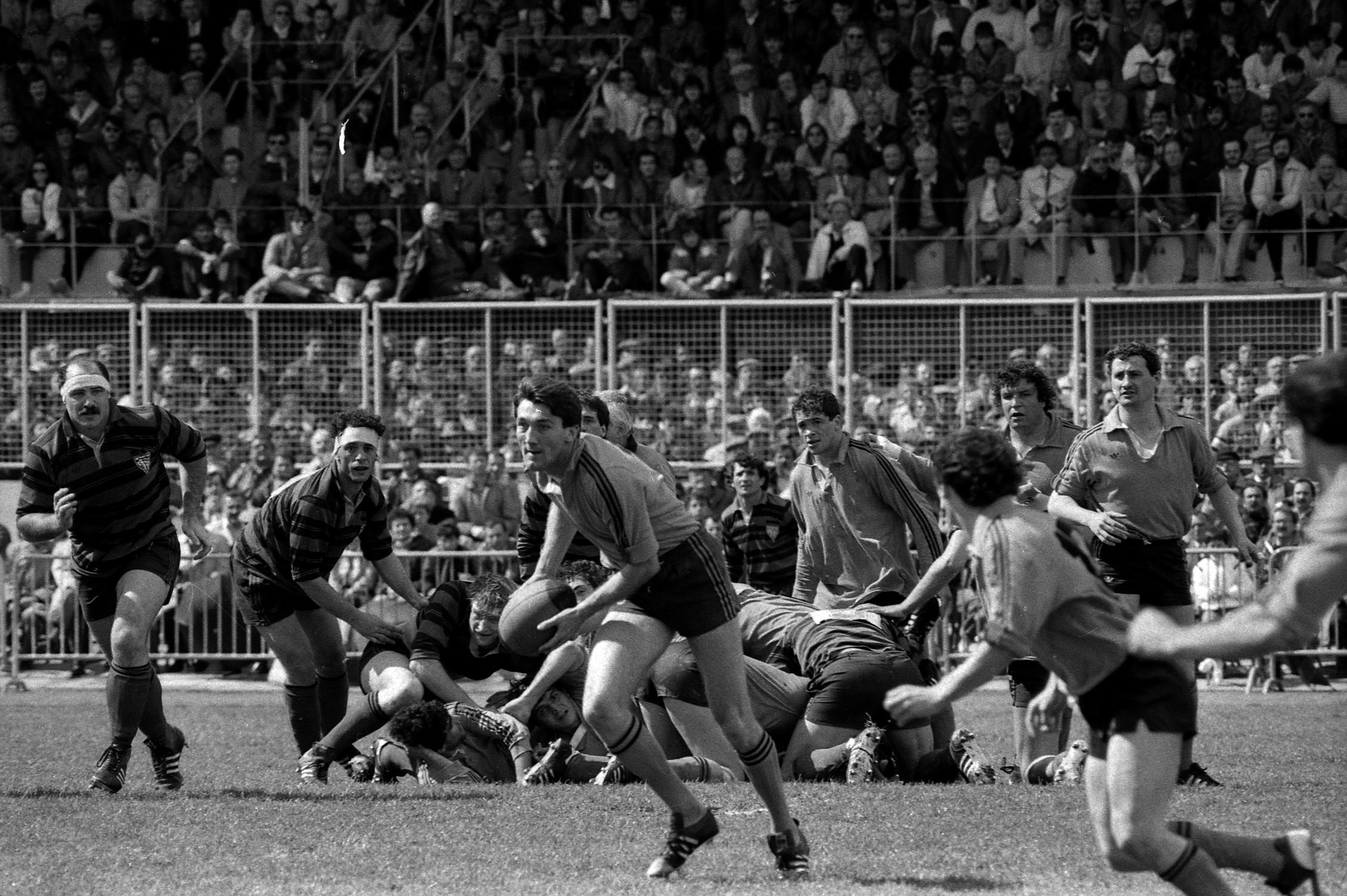 Stade Albert Domec à Carcassonne. Le14 Avril 1985. Vue d'une phase de jeu entre le Stade Toulousain et Narbonne.